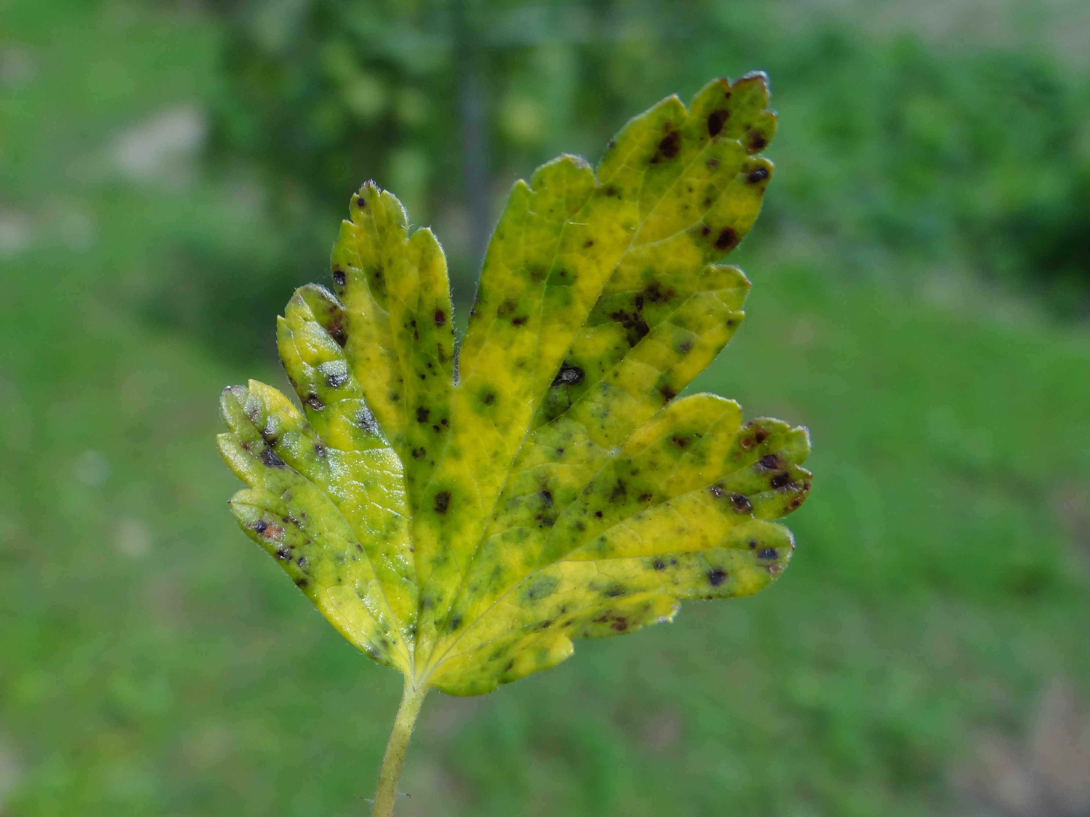 Drepanopeziza ribis on Ribes uva-crispa